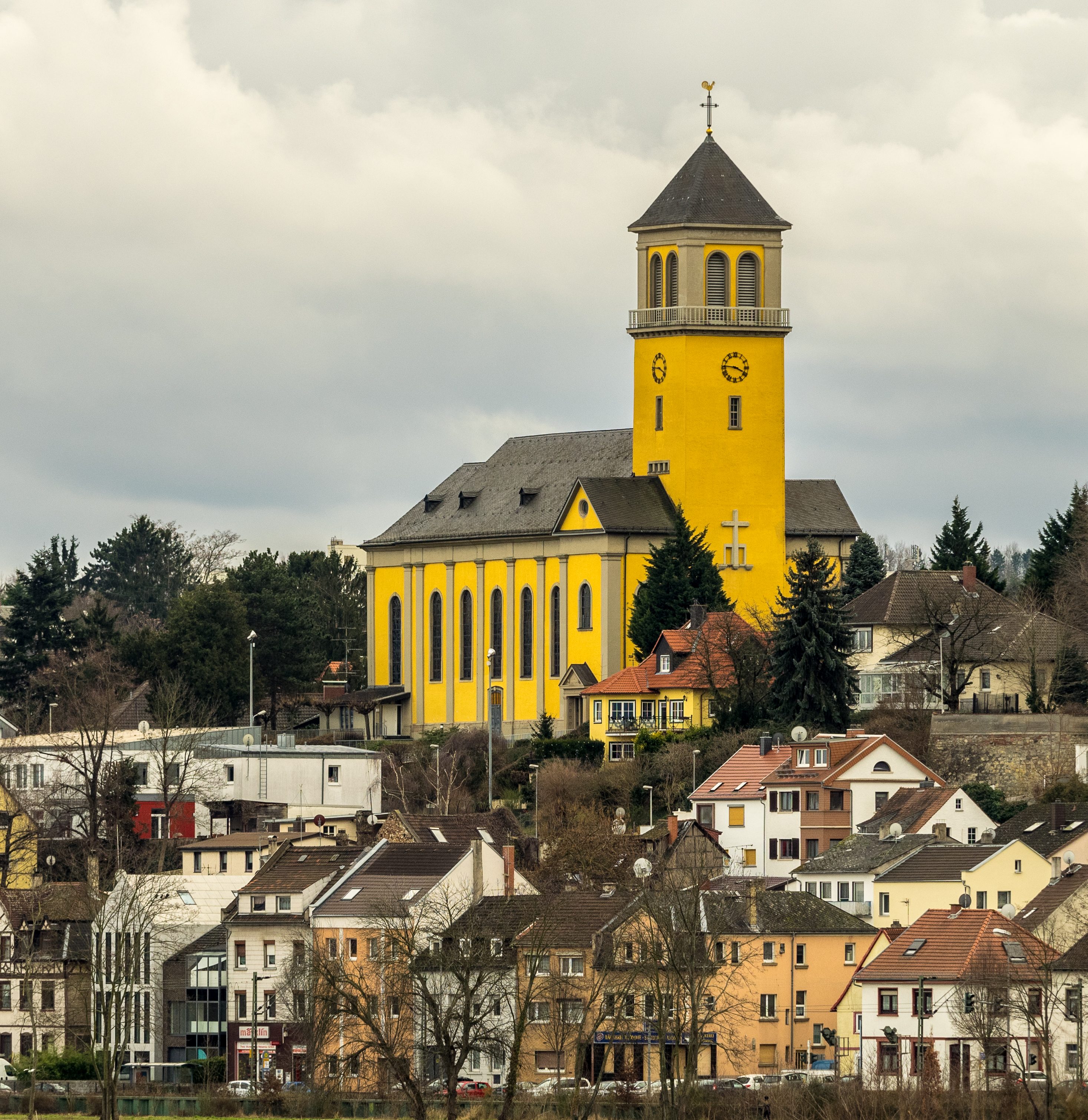 Katholische Pfarrkirche Mariä Himmelfahrt über Mainz-Weisenau. Ansicht von der anderen Rheinseite.